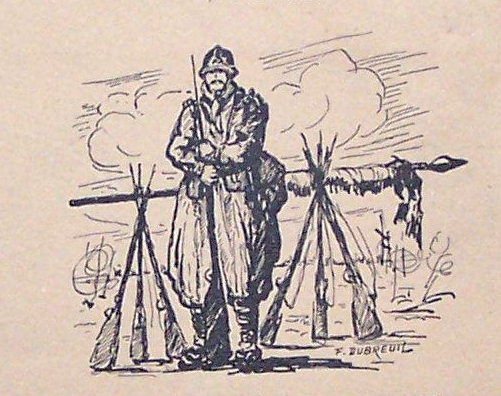 Illustration de F. Dubreuil pour la couverture du livre de Jean des Cilleuls, Pages de Gloire du 32e Régiment d’infanterie (1914-1918), Gilbert Claret, Tours